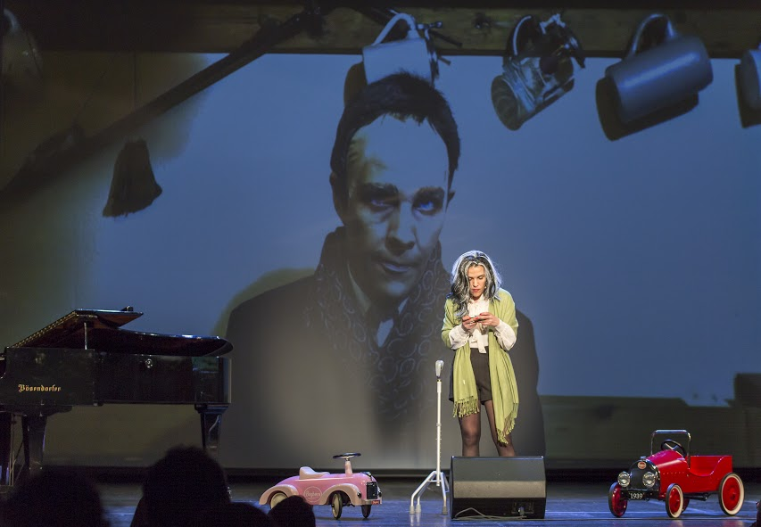 Aida Loos bei der Premiere von "Achtung! Fertig! Loos!" am 8. April im Theater Akzent als Maria Vassilakou auf der Bühne und als Hein Christian Strache auf der Leinwand.